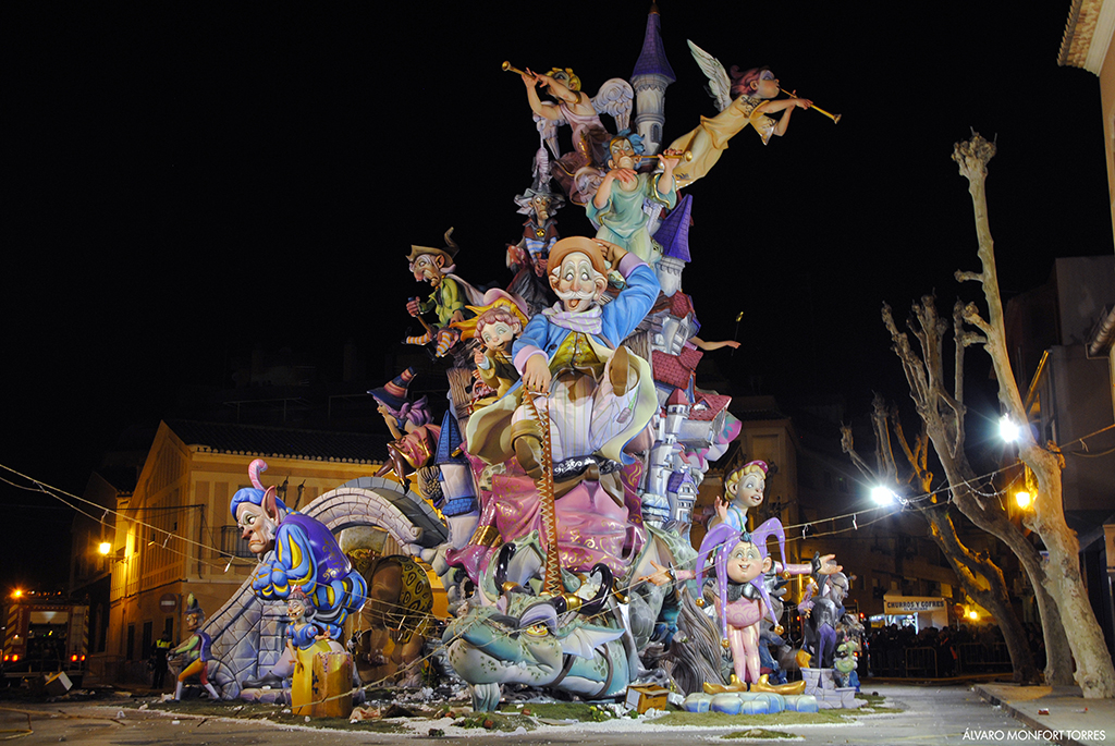 Falla Oeste de Denia This is a photography of a Folklore festival in Spain (Wikidata id Q47120057).